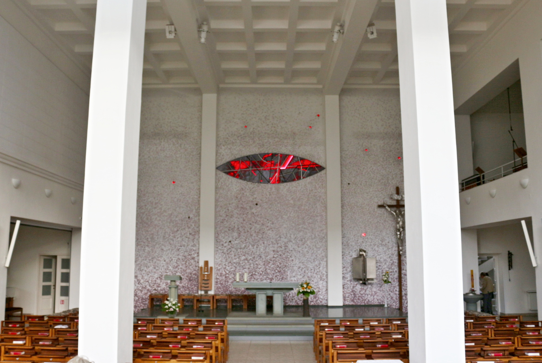 Kobylisy kostel sv. Terezie